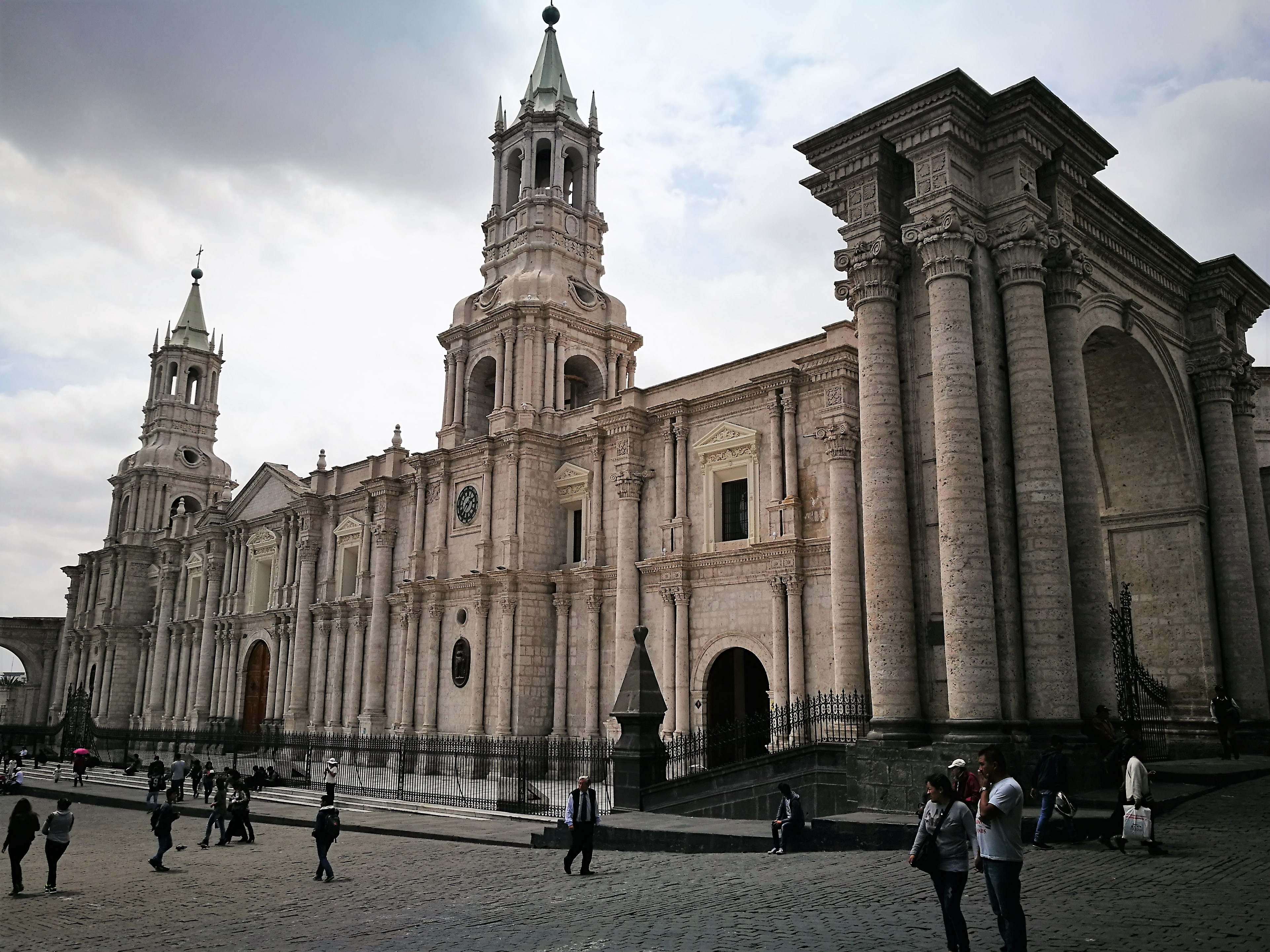 Façana de la catedral d'Arequipa